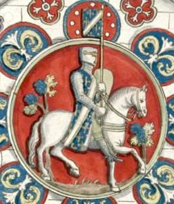 Thibaut VI de Blois